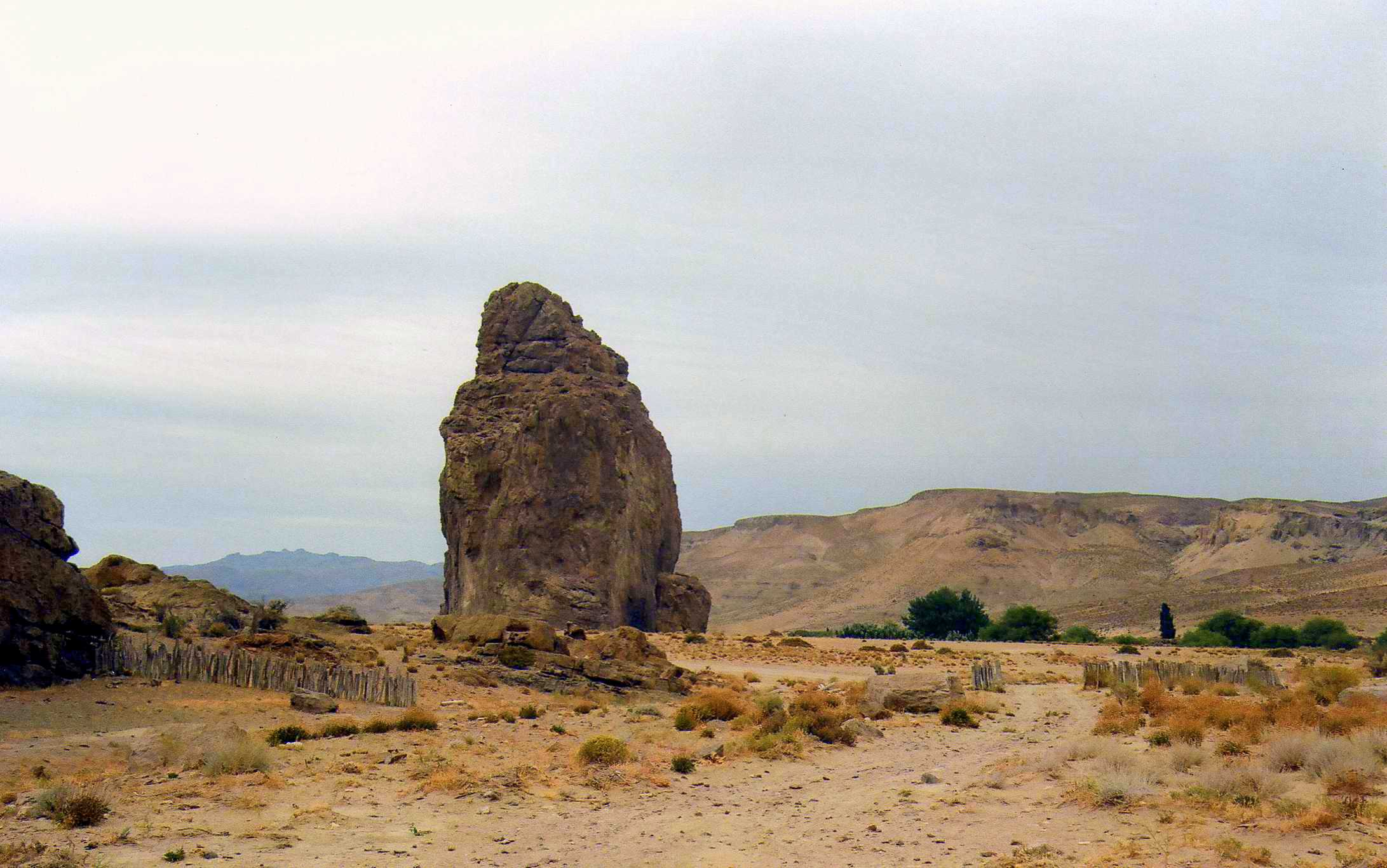 Piedra Parada, Chubut, Argentina